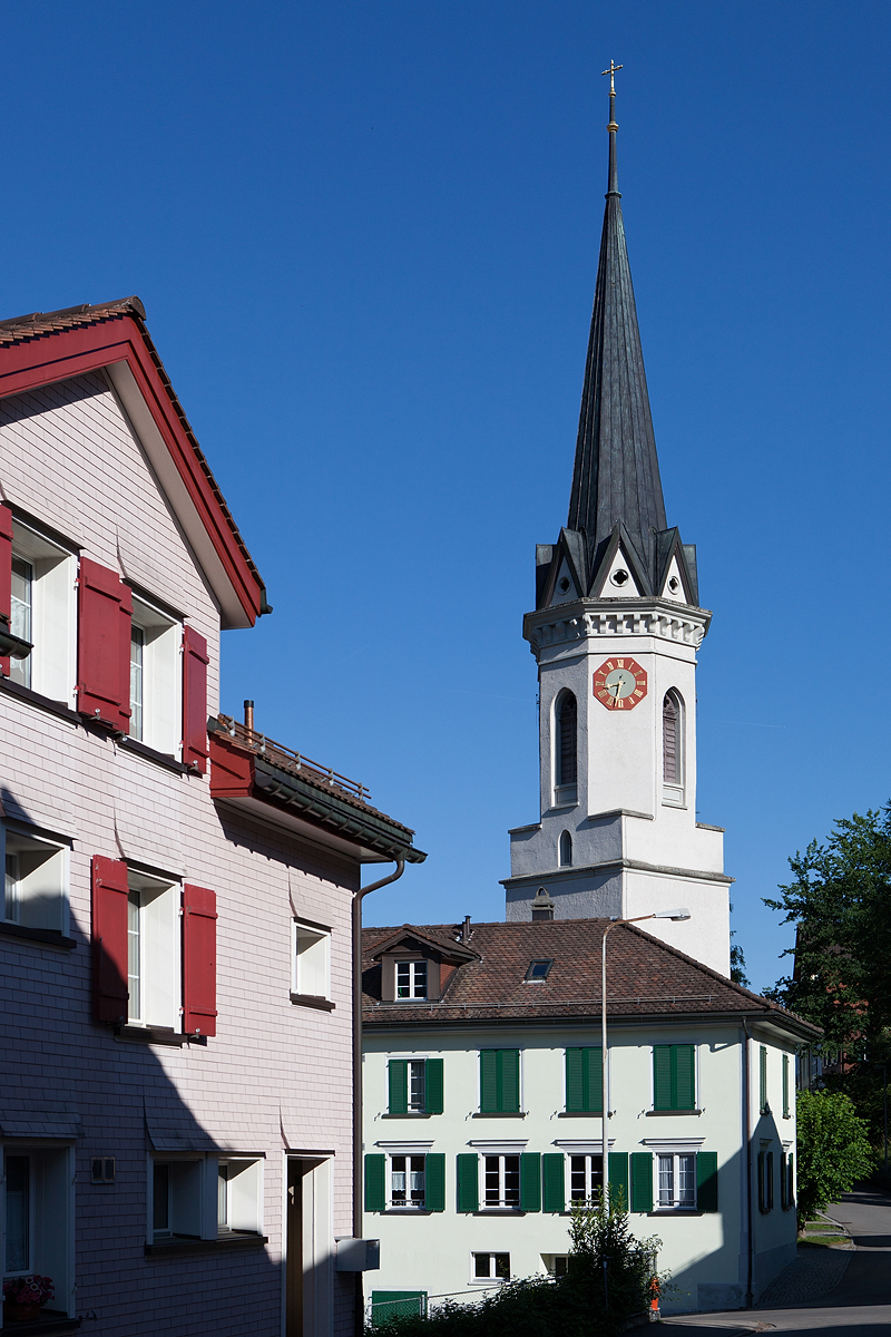 Katholische Kirche von Ebnat-Kappel